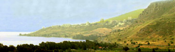 Madgdala zone: la vallée - Nazag